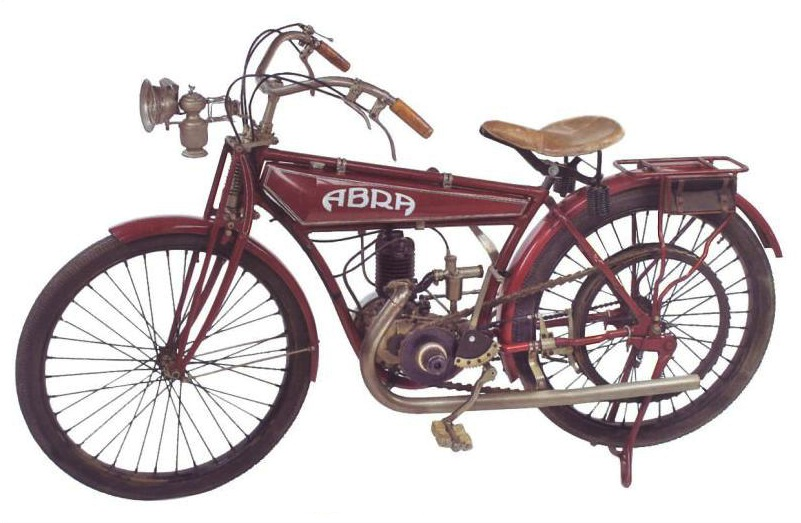 Afbeelding dateert uit 1924